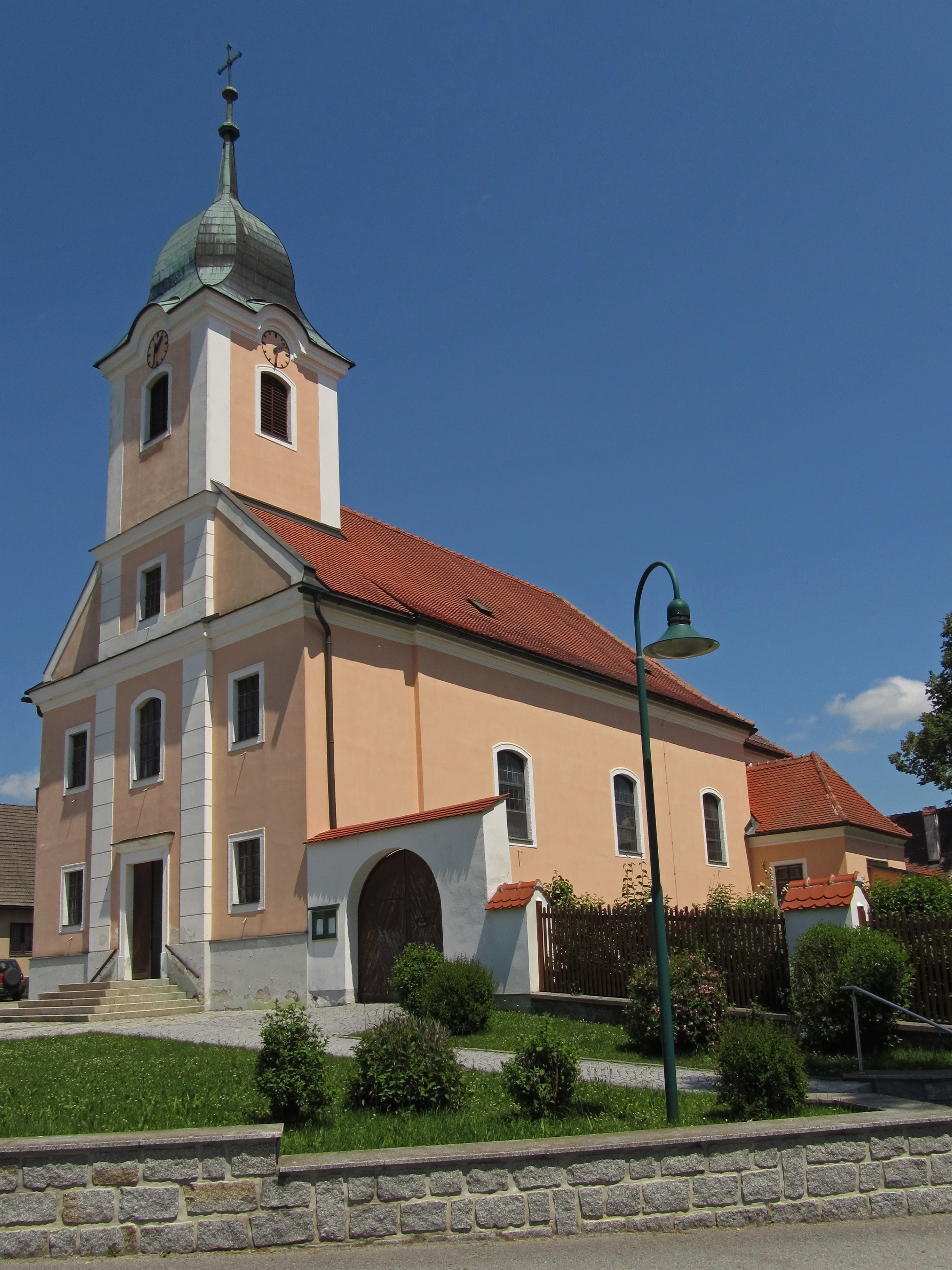 Kath. Pfarrkirche hl. Ägyd in Eggern